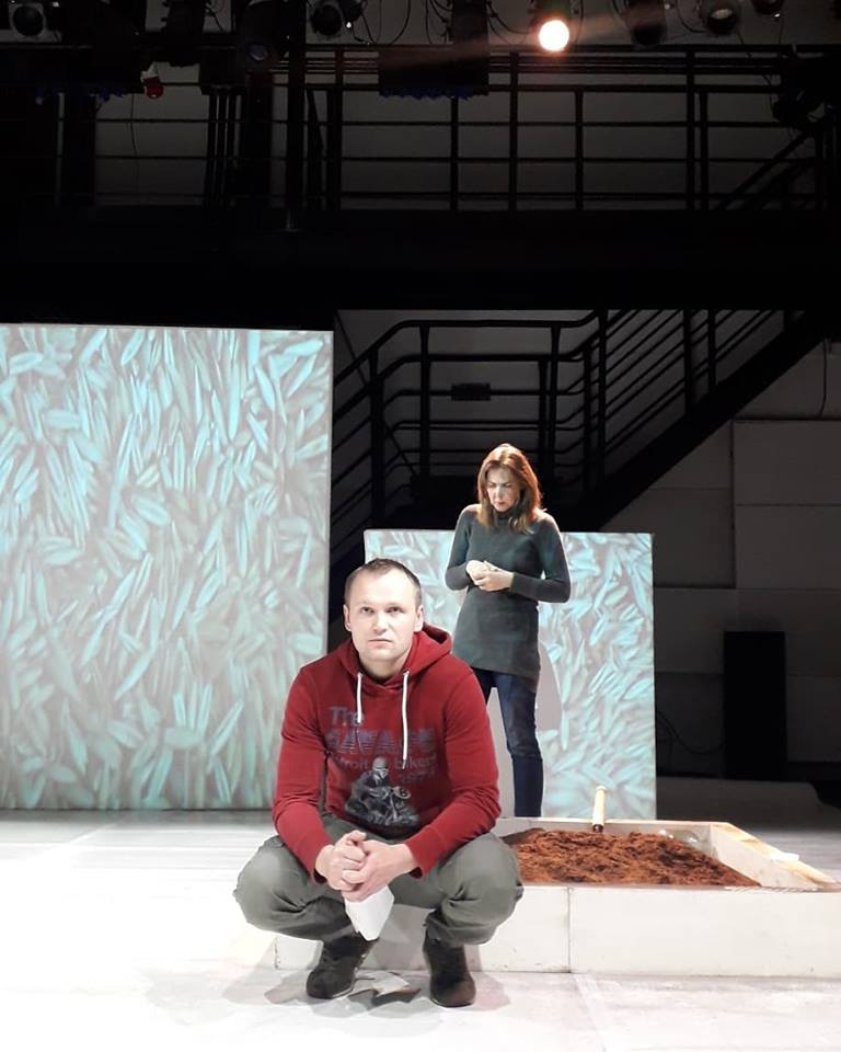 Спектакль по пьесе В. Королёва "Опиум" (Минск)